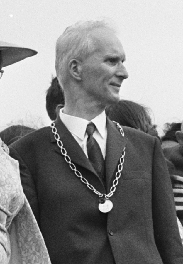 Koningin Juliana met burgemeester Sprenger tussen de bevolking